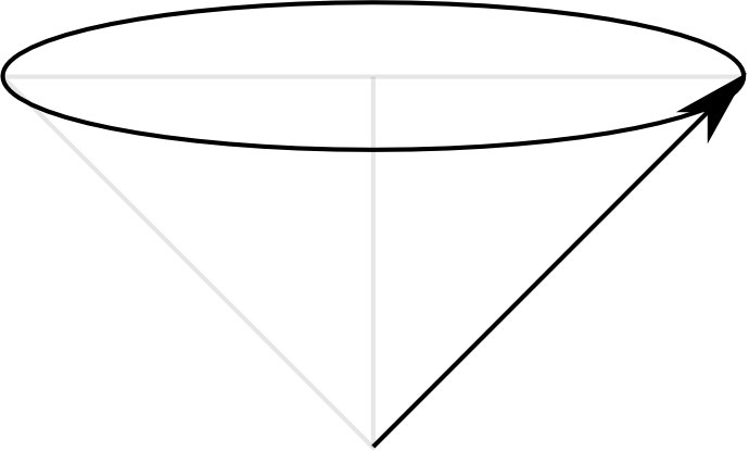 Espín de un electrón, la longitud de la flecha y su proyección sobre el eje z son aproximadamente las que corresponden a lo que corresponde a s y s_z